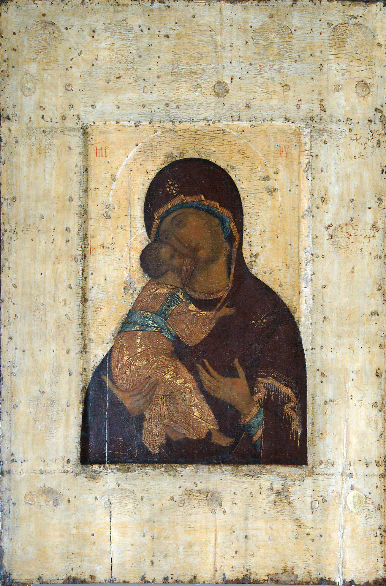 Богоматерь Владимирская. 1395 – сер. 1410-х гг. ВСИХМЗ. Инв. В-2971. 101×69 см. На обороте — изображение Голгофского креста — живопись XIX в. Происходит из Успенского собора во Владимире, откуда в 1921 или в 1923 г. была передана во Владимирский музей. Раскрыта в 1918 г. владимирской экспедицией Всероссийской комиссии по сохранению и раскрытию памятников древней живописи И. Э. Грабаря (Г. О. Чириков, Ф. А. Модоров, И. А. Баранов). Одна из самых древних копий считавшейся чудотворной византийской иконы «Богоматерь Владимирская» н. XII в., сделанная в размер оригинала. Рублеву икону приписывают И. Э. Грабарь, А. И. Анисимов, В. Н. Лазарев, Г. И. Вздорнов, В. Н. Сергеев, Э. К. Гусева, В. Г. Брюсова, В. А. Плугин, в то время как М. В. Алпатов и Э. С. Смирнова решительно отвергают его авторство. Икону часто датируют 1408 г., исходя из факта работы Рублева и Даниила во Владимире. (В. Г. Брюсова датирует ее 1409–1411 гг.) Однако в написании иконы в 1408 г. не было необходимости, так как древний образ, кажется, находился тогда во Владимире. Во всяком случае, он был там в 1410 г., см.: ПСРЛ. Т. 6. СПб., 1897:216. Можно предположить, что произведение исполнено в Москве в связи с событиями 1395 г., когда сюда временно привезли древнюю «Богоматерь Владимирскую».